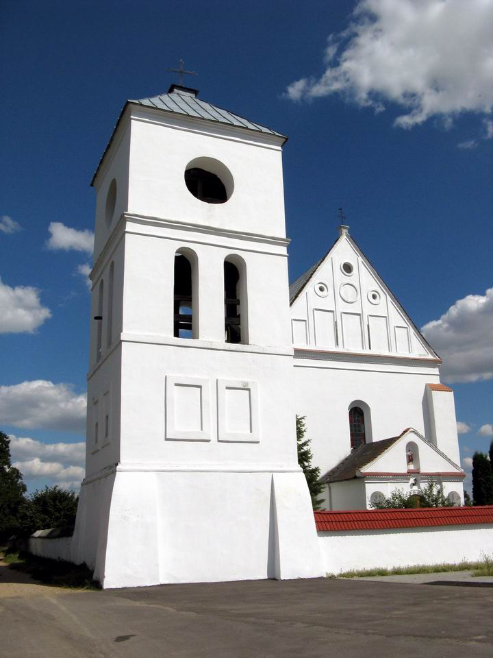 Беларуская (тарашкевіца): Чарнаўчыцы